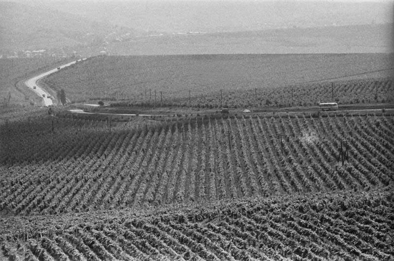 In Hîncești district, 1980